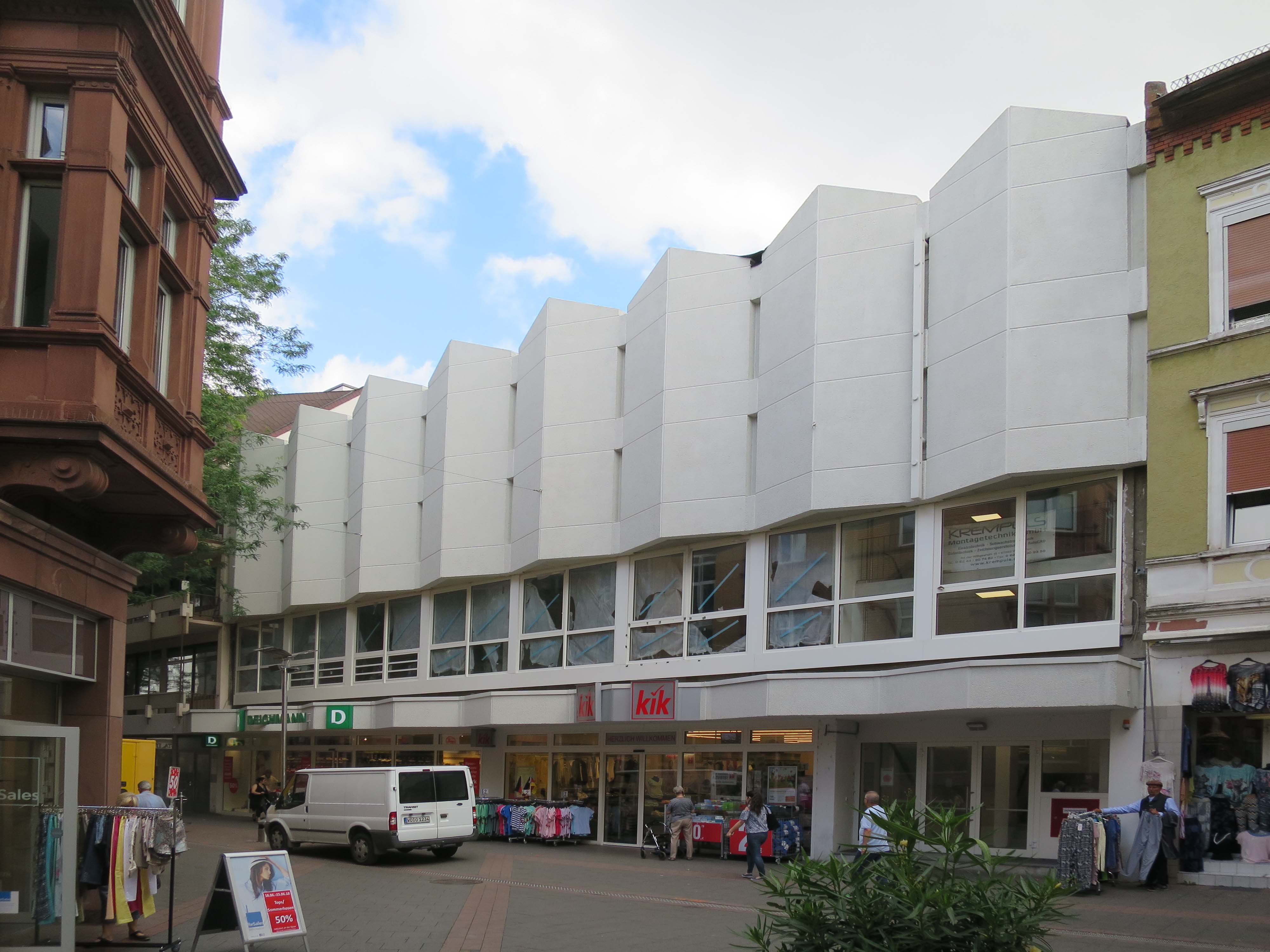 Worms, Wilhelm-Leuschner-Straße 16